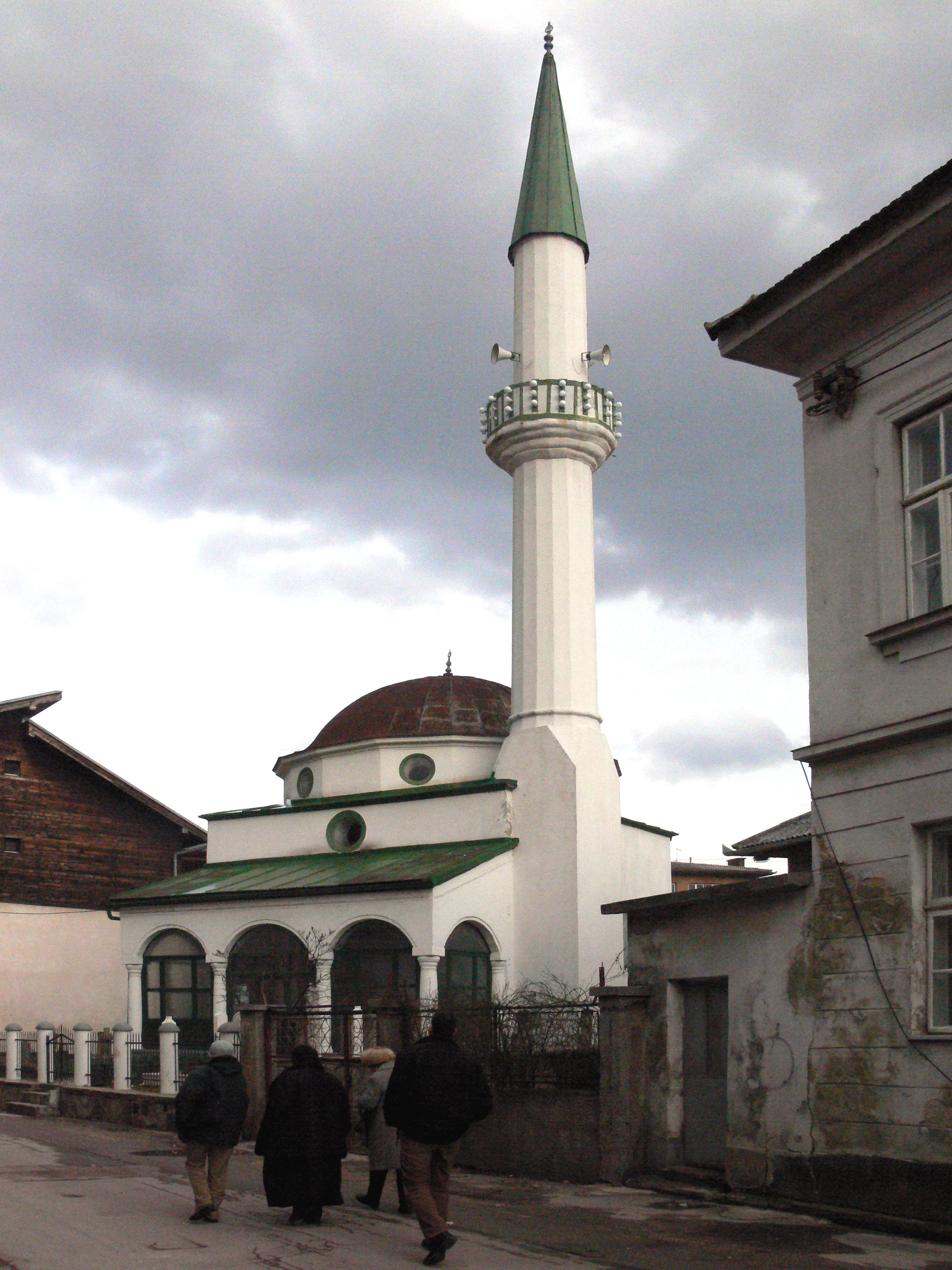 Mosque in Travnik.